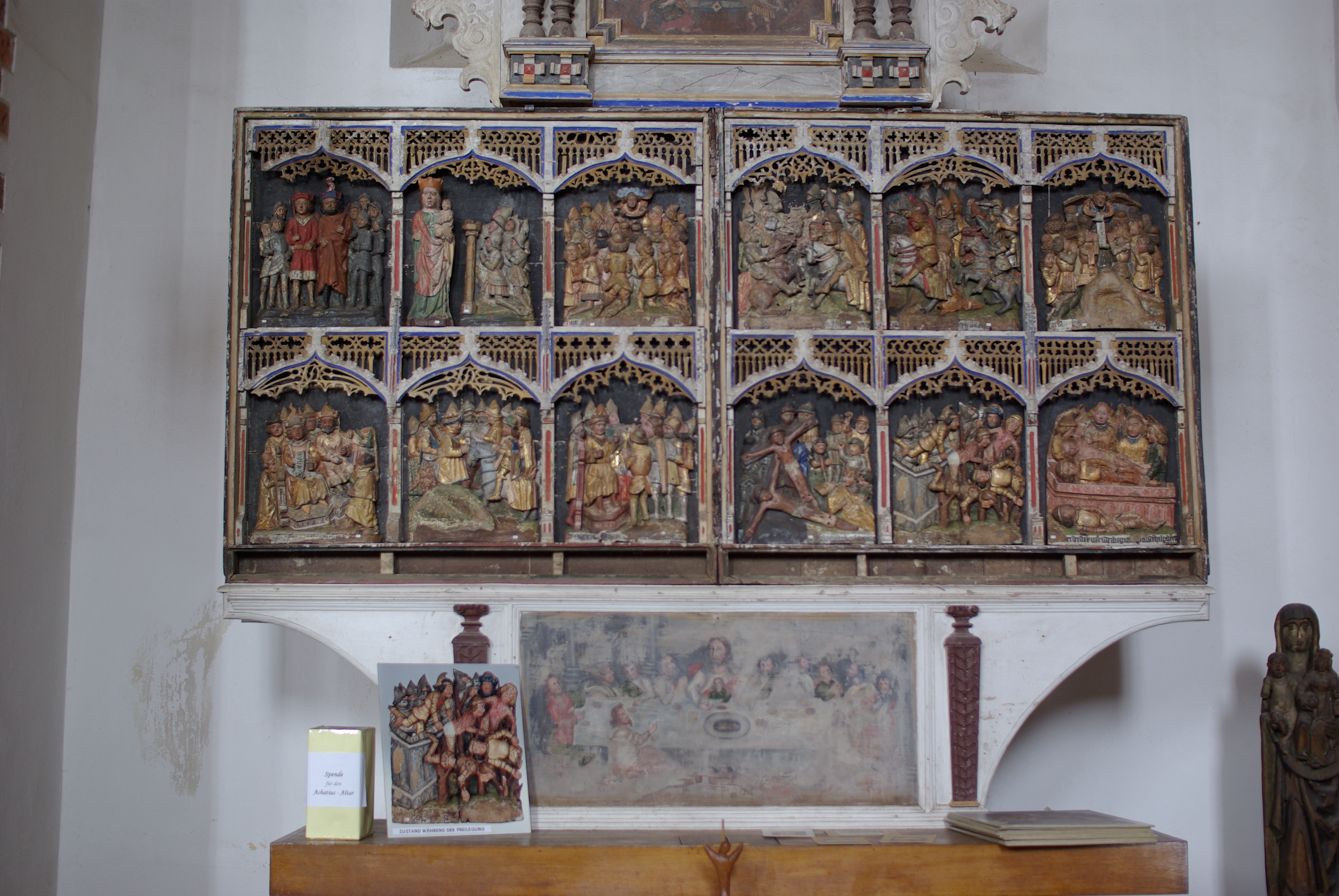 Kyritz in Brandenburg, Marienkirche: Achatiusaltar in der Brautkapelle